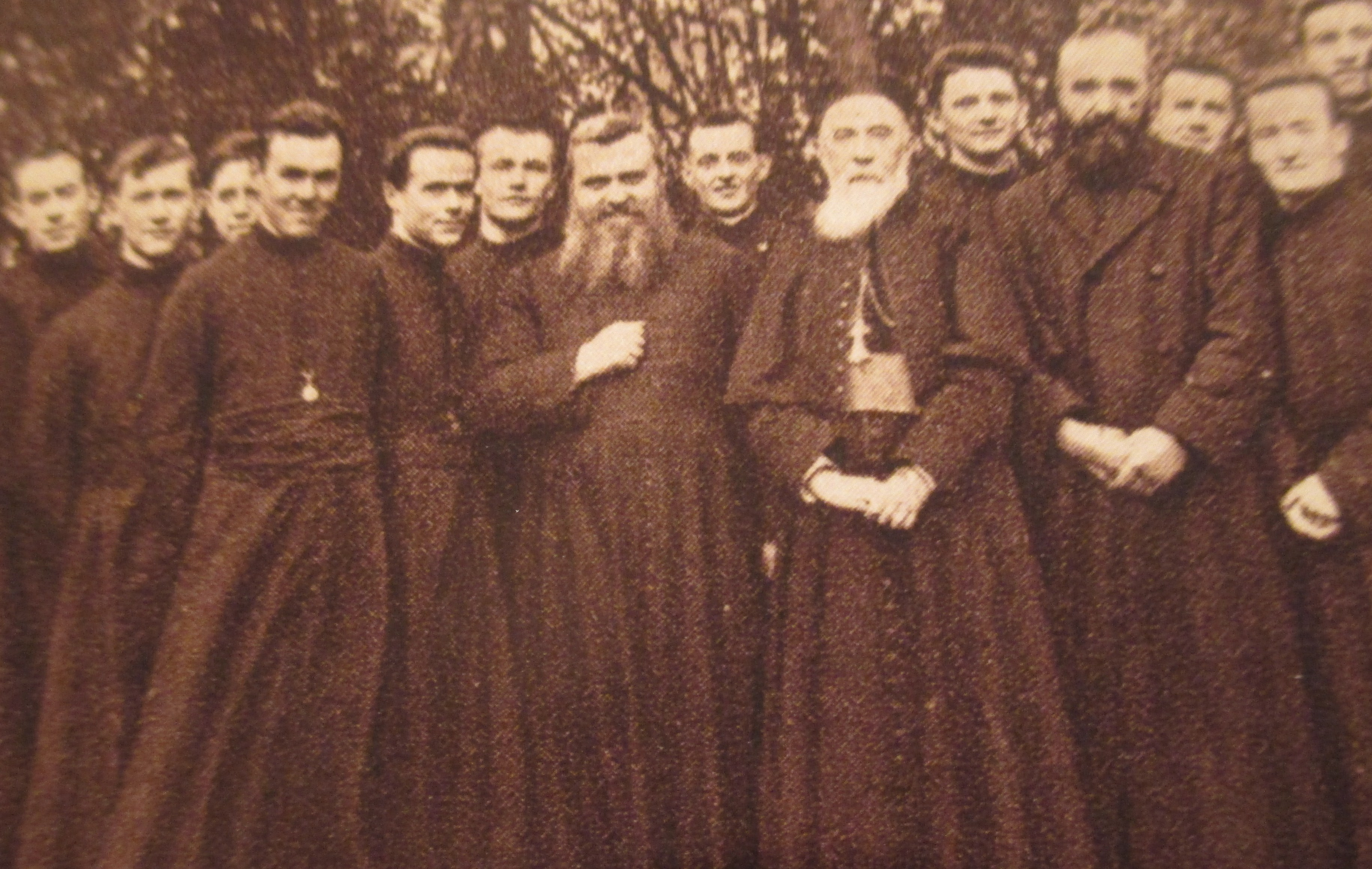 Mgr de Guébriant (1860-1935), supérieur général des Missions étrangères de Paris (avec la barbe blanche) au milieu de candidats bretons au départ, in Mgr de Guébriant, Paris, éd. séminaire des Missions étrangères de Paris, 1935